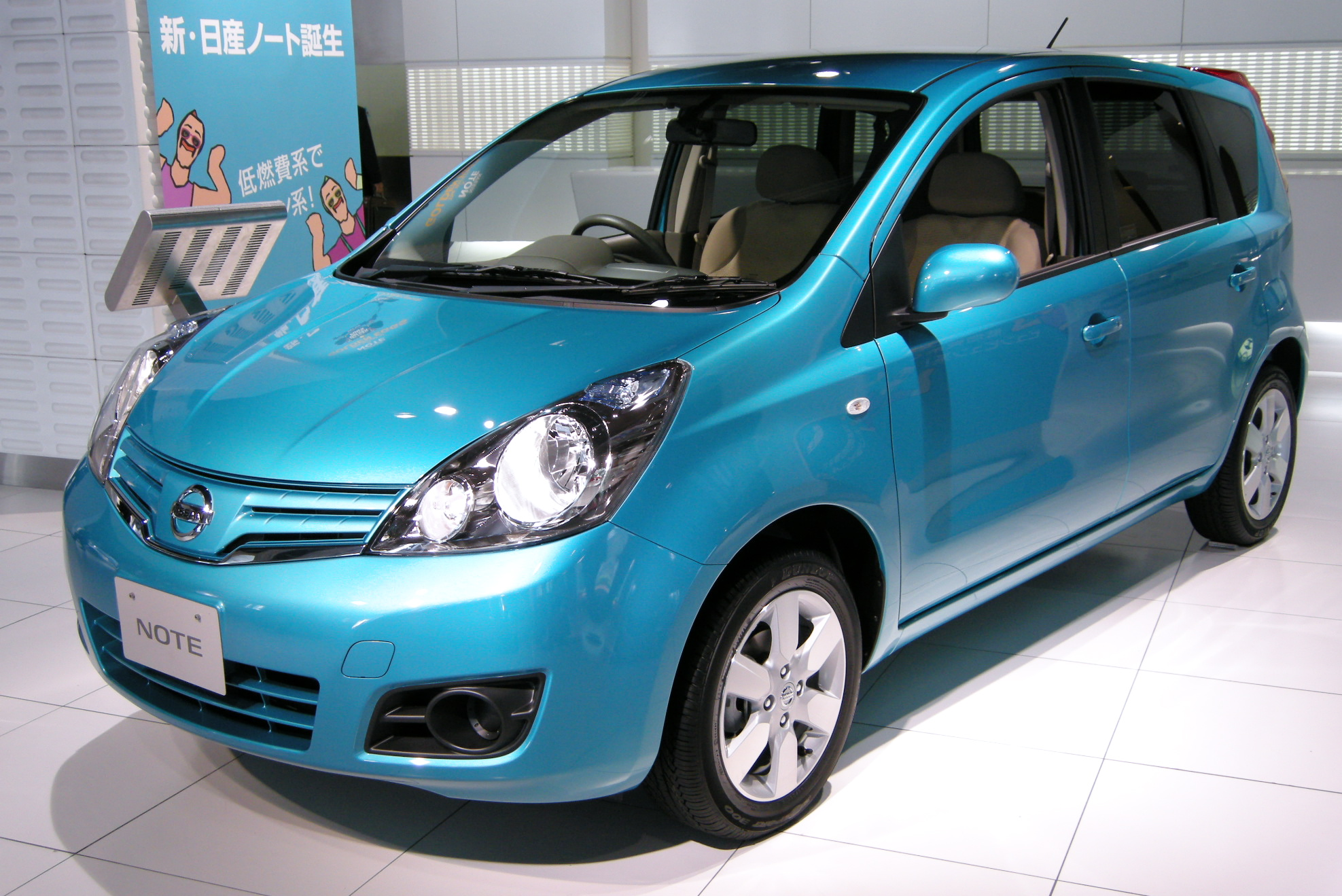 2008 Nissan Note in Nissan Gallery (Ginza, Tokyo)